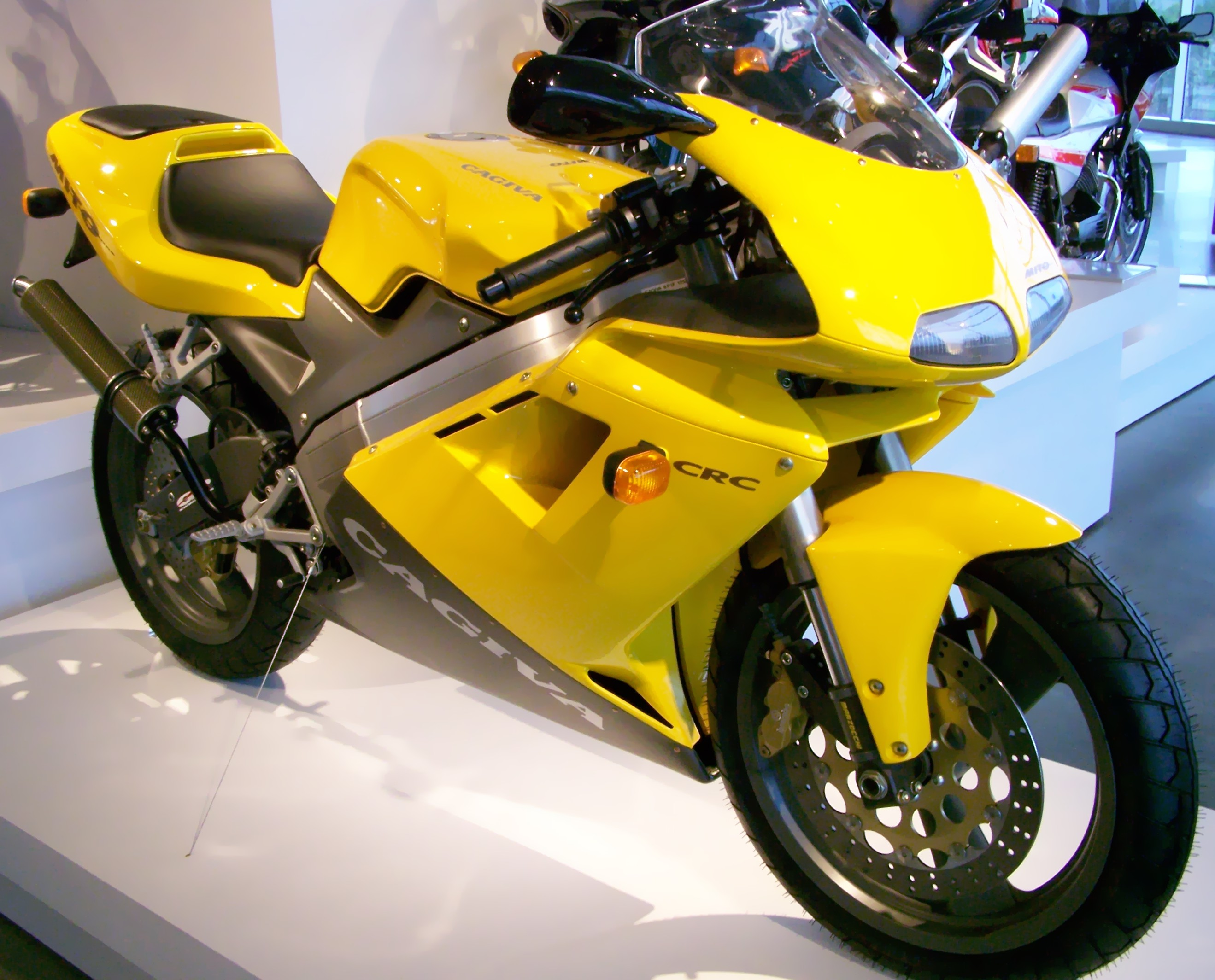 Barber Vintage Museum_190 1995 Cagiva Mito125